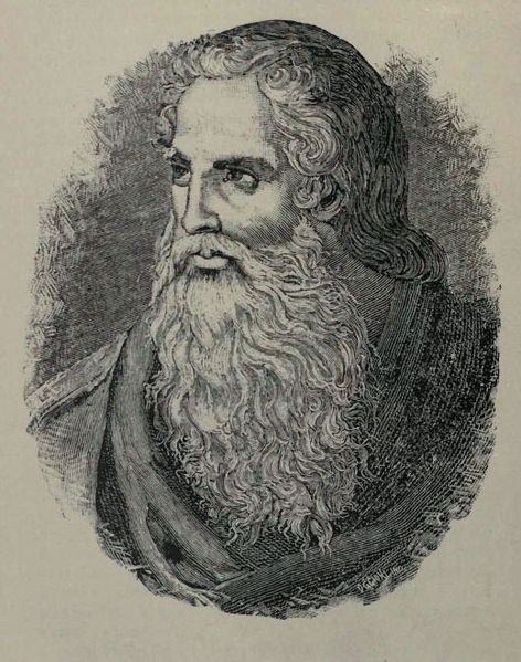 From Moses of Chorene illustration in 1898 book «Illustrated Armenia and Armenians», Only existing illustration of 5th century Armenian historian Movses Khorenatsi